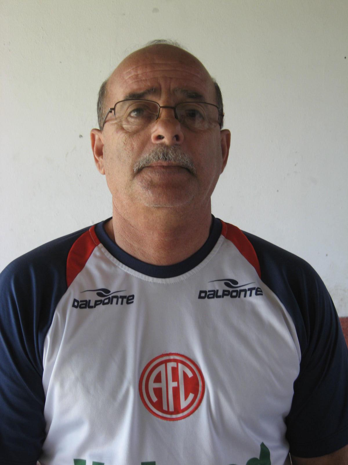 Gílson Gênio, ex-jogador de futebol e atualmente treinador.